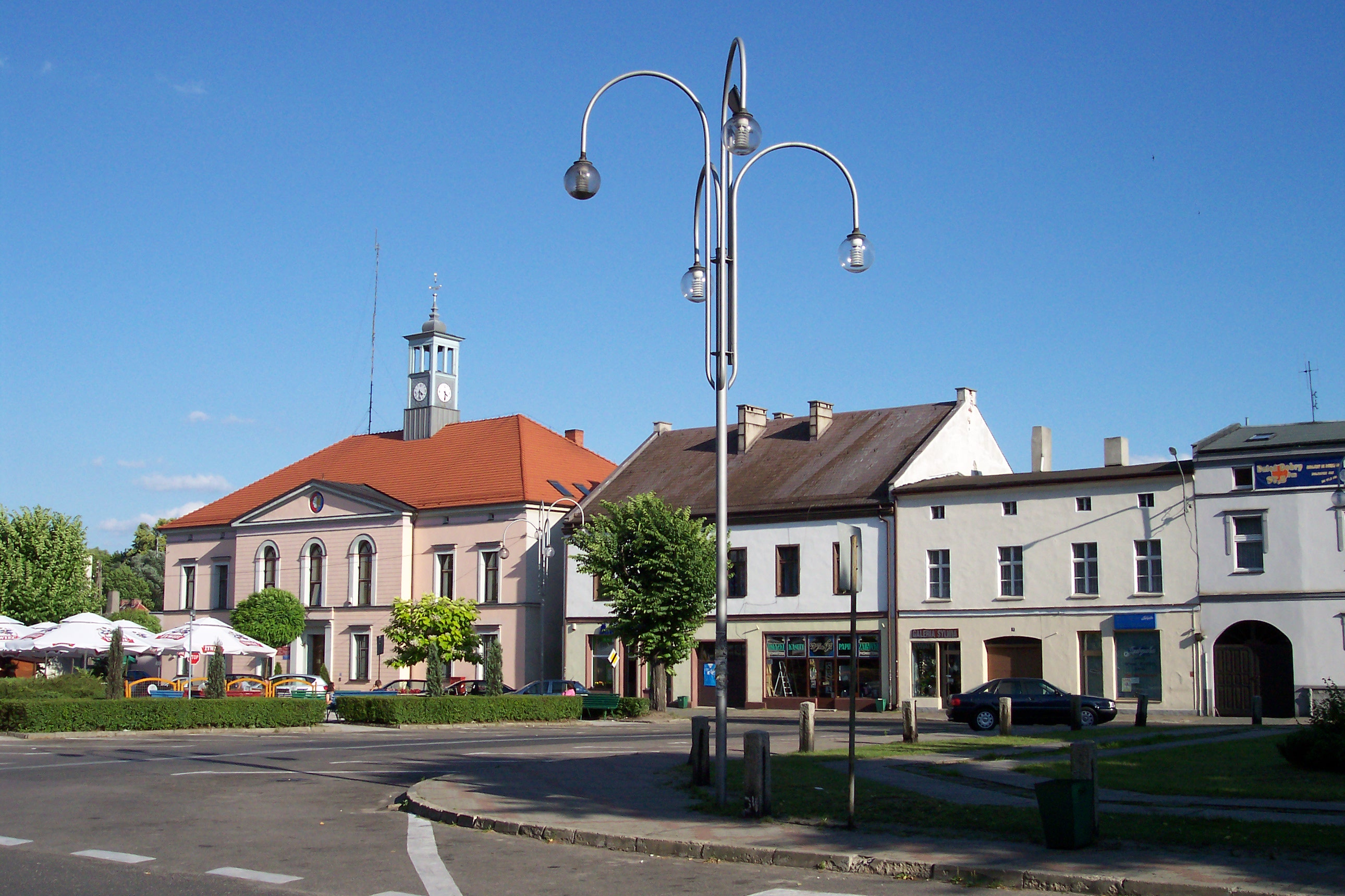 Marktplatz in Dobrodzień/Polen